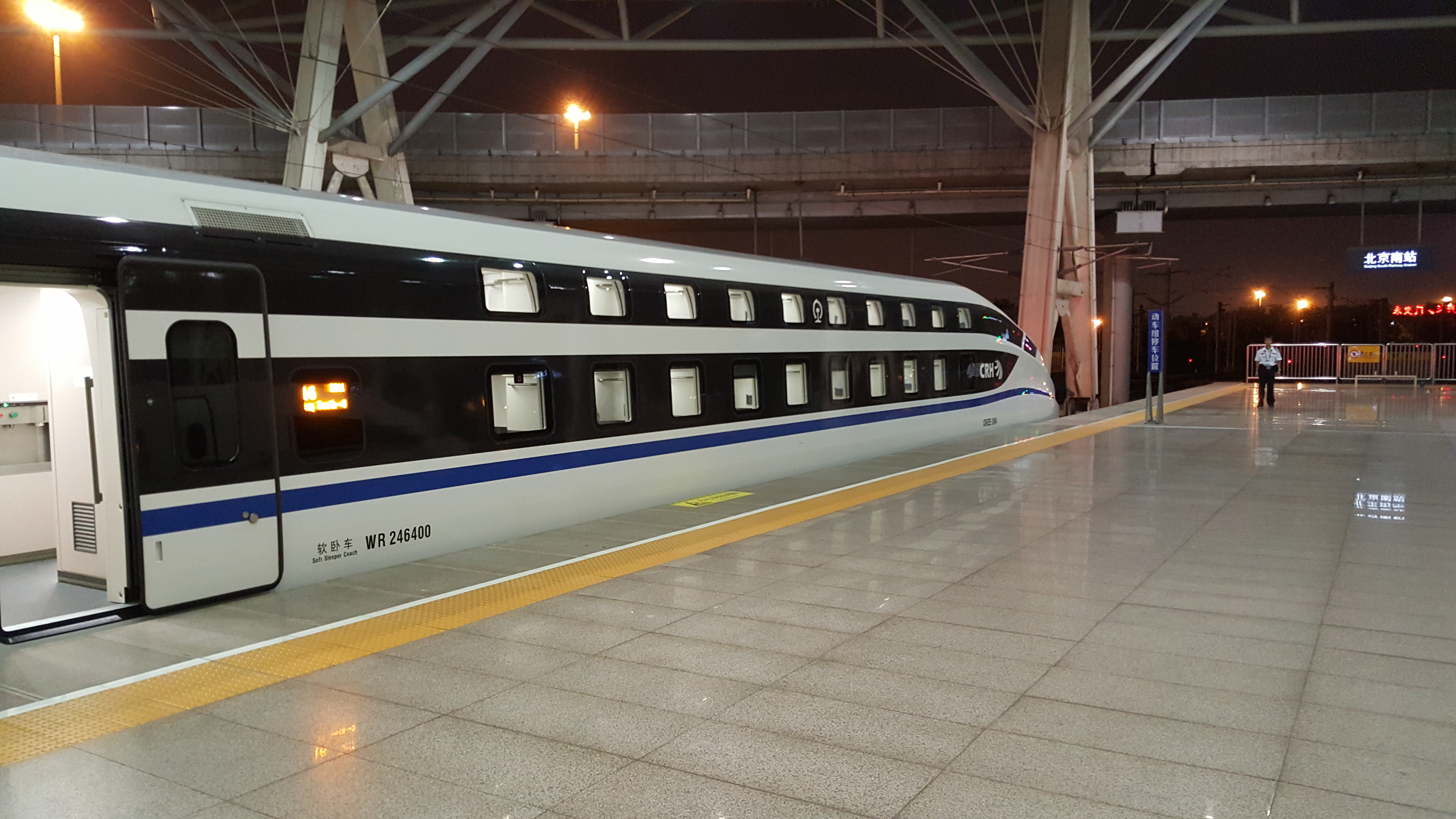 中文（中国大陆）: CRH2E-2464停靠在北京南站6站台